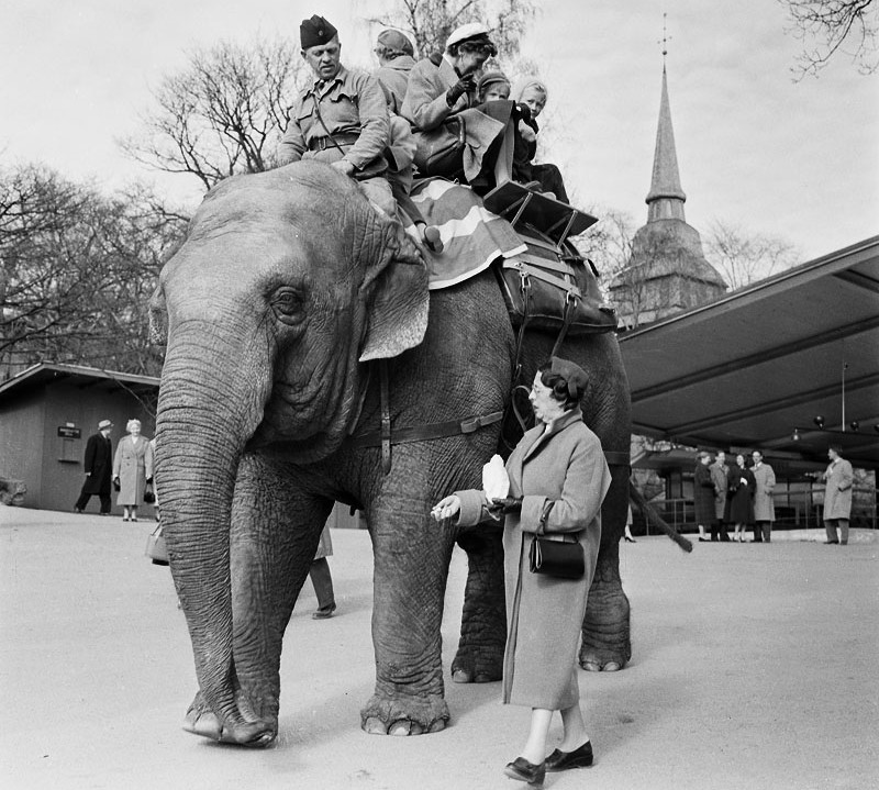 Skansen. Besökare rider på elefanten Bambina, framtill sitter djurskötaren Sven Borg. Sista året för elefantridning på Skansen. I bakgrunden t. h. Hällestadsstapeln. Beteckning: Fotonummer SvD 36116